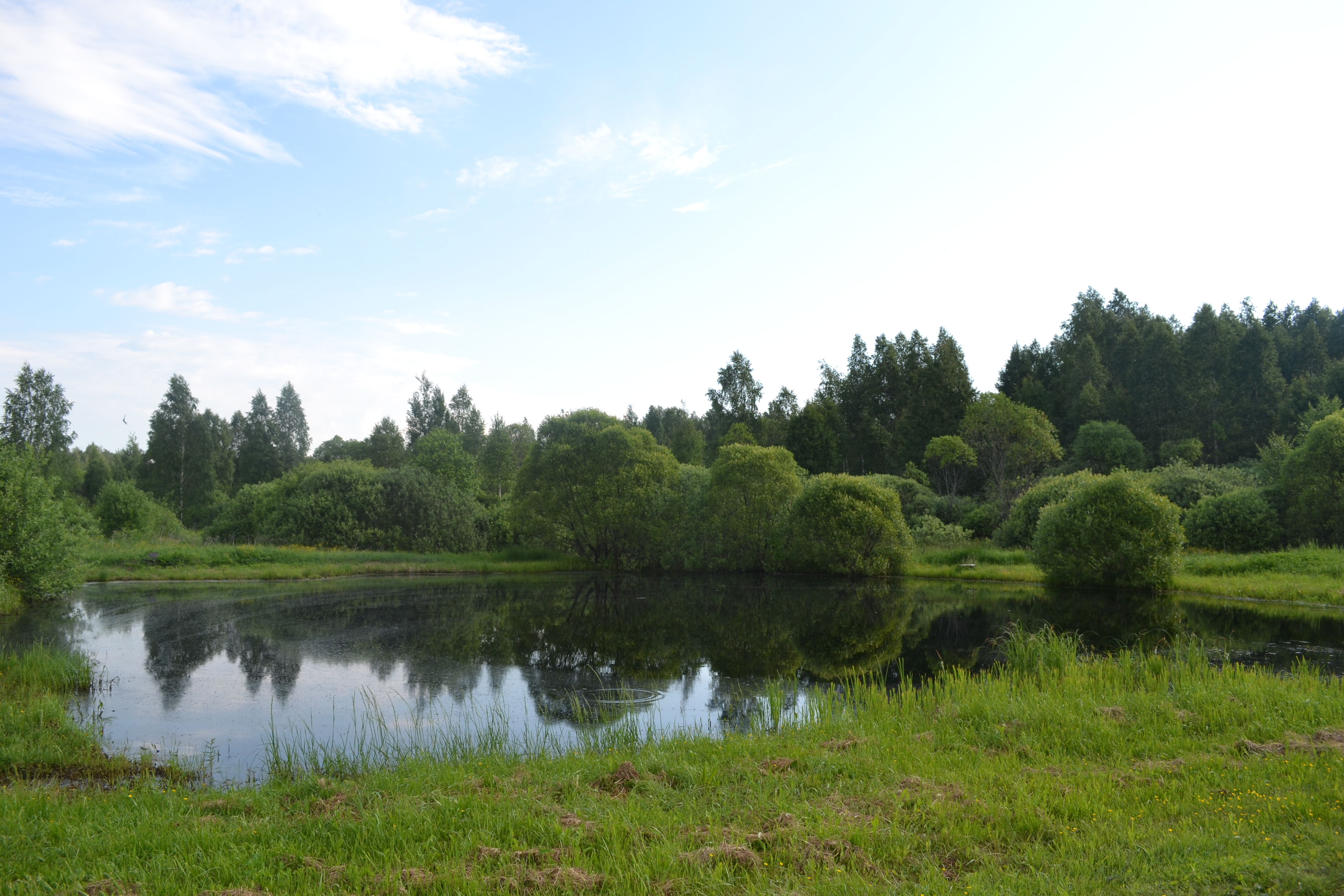 Пруд в деревне Семёновская (Пышлицкое сельское поселение)